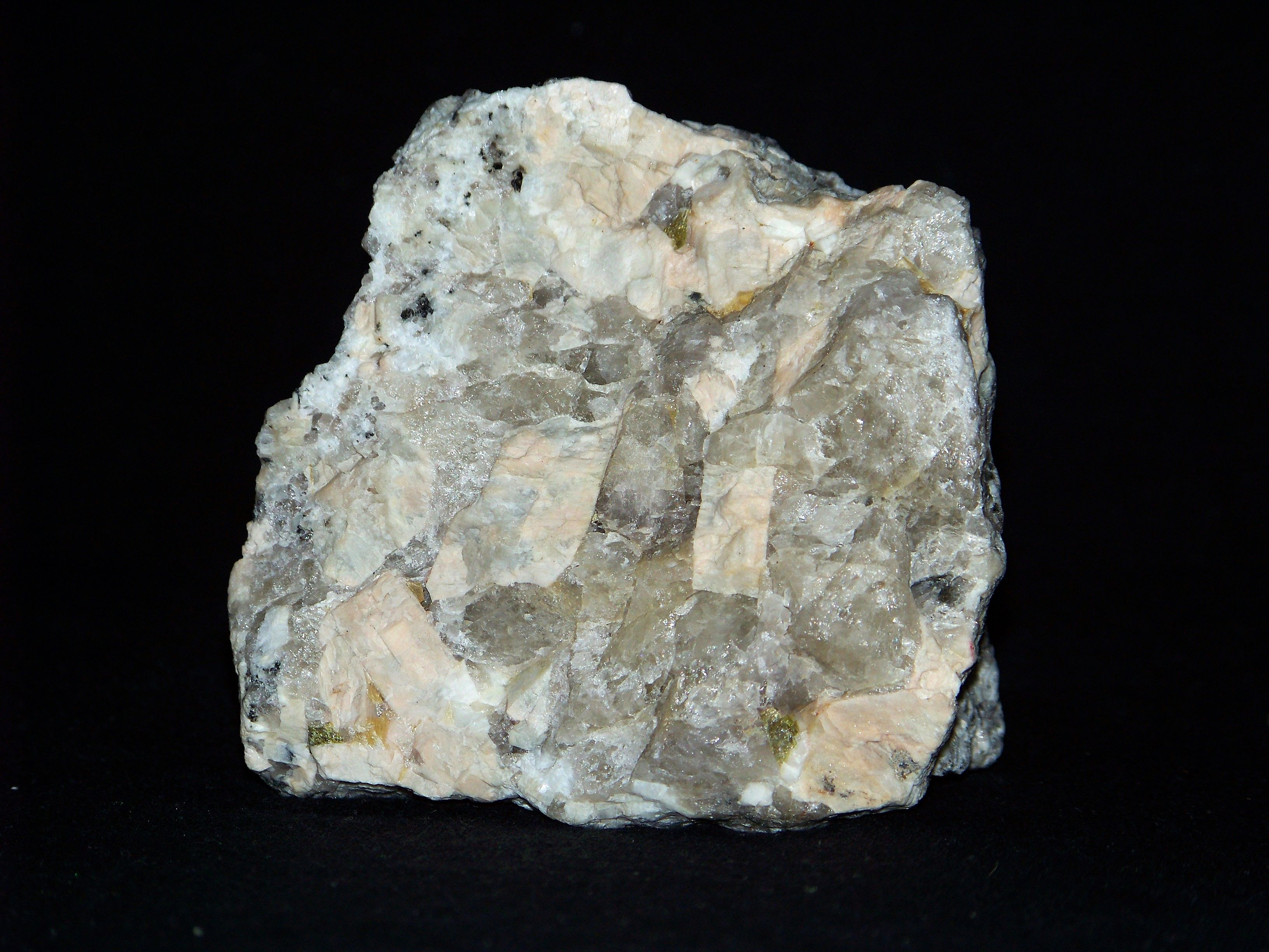 Pegmatyt z widocznymi zielonymi epidotami